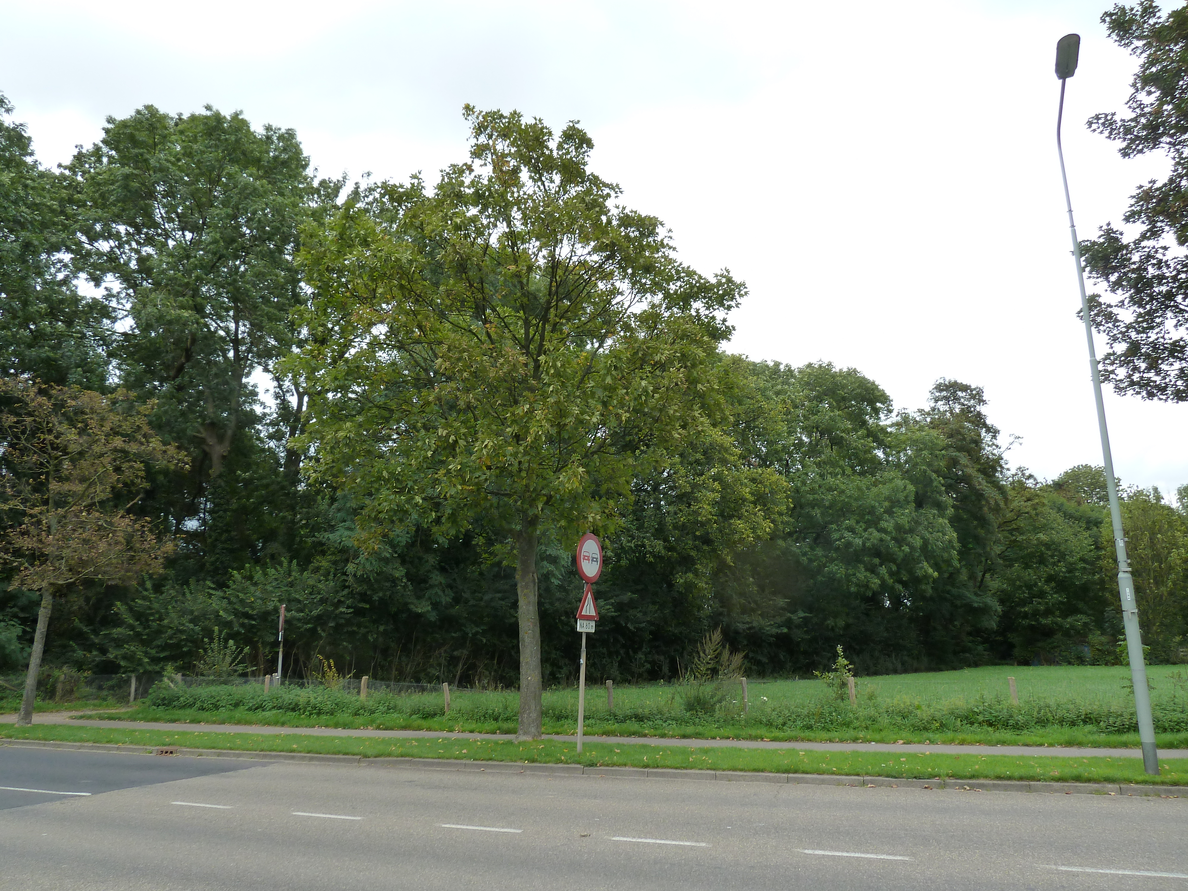 De Wallen van Stein, een landweer, Stein, Limburg, Nederland